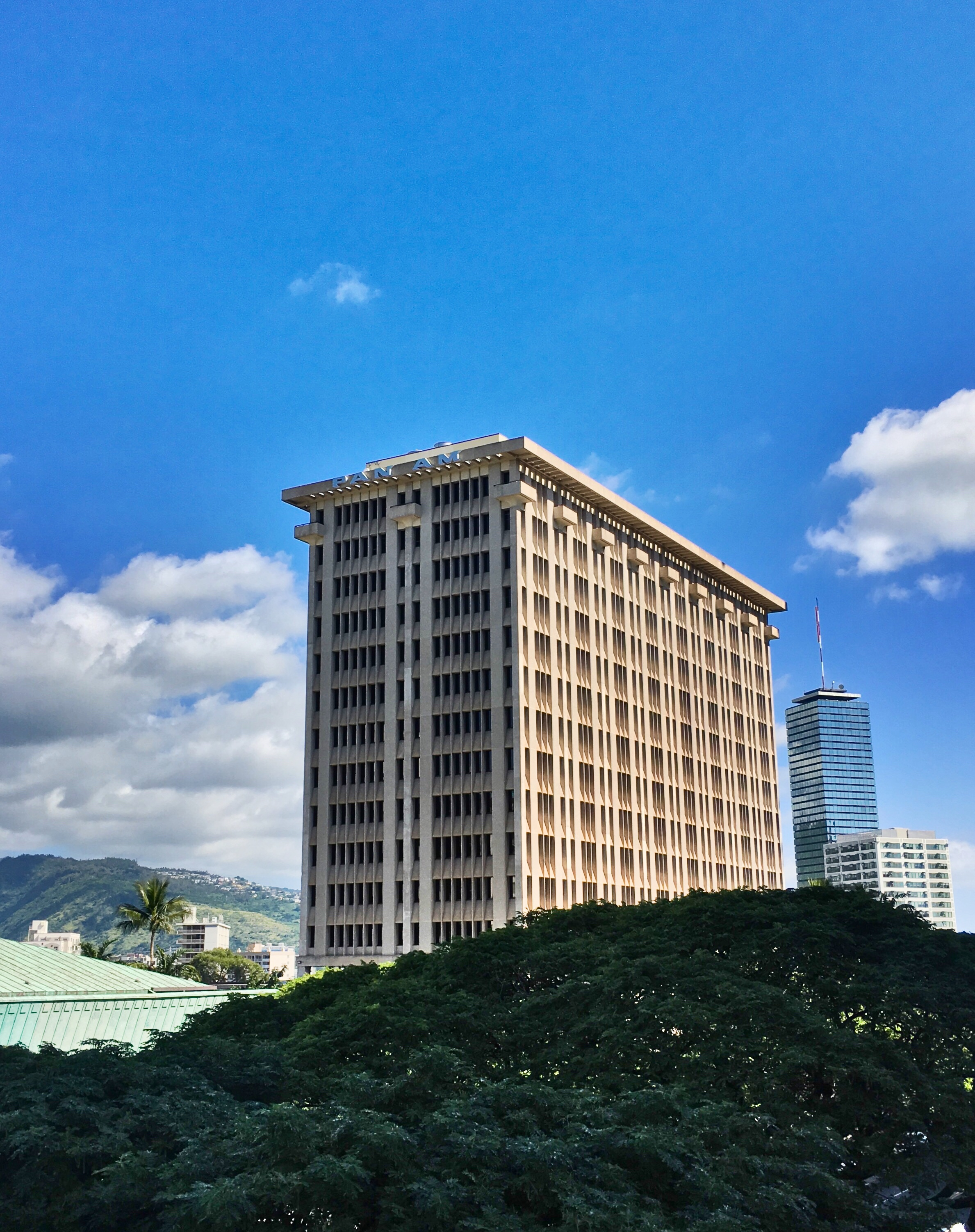 Pan Am Building, Honolulu